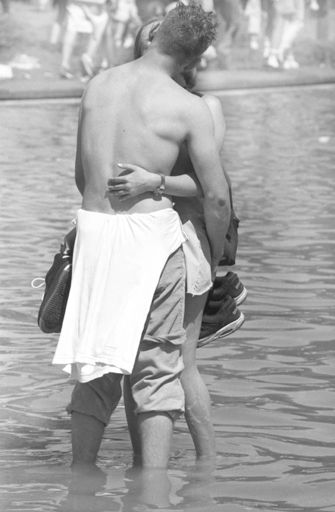 Liebende in Berlin